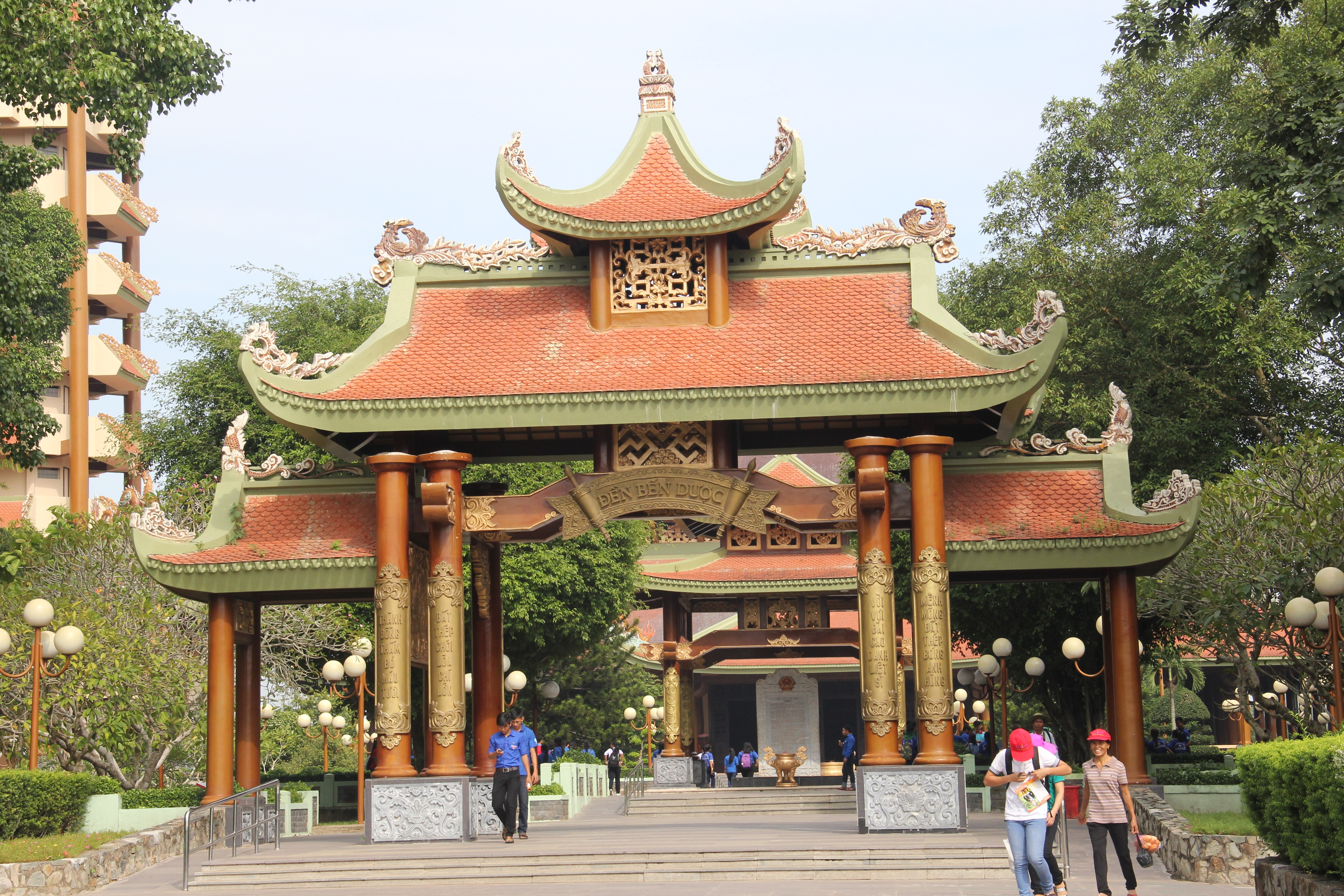 W Củ Chi Đền Bến Dược tại Củ Chi